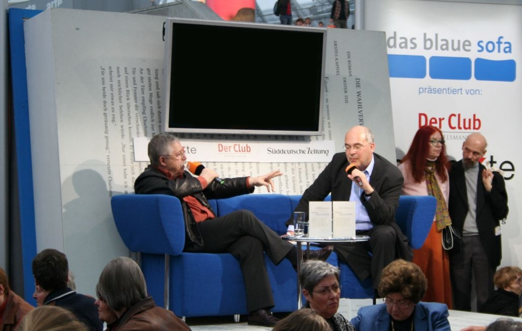 Wolf Biermann im Interview auf dem "Blauen Sofa" auf der Leipziger Buchmesse 2007